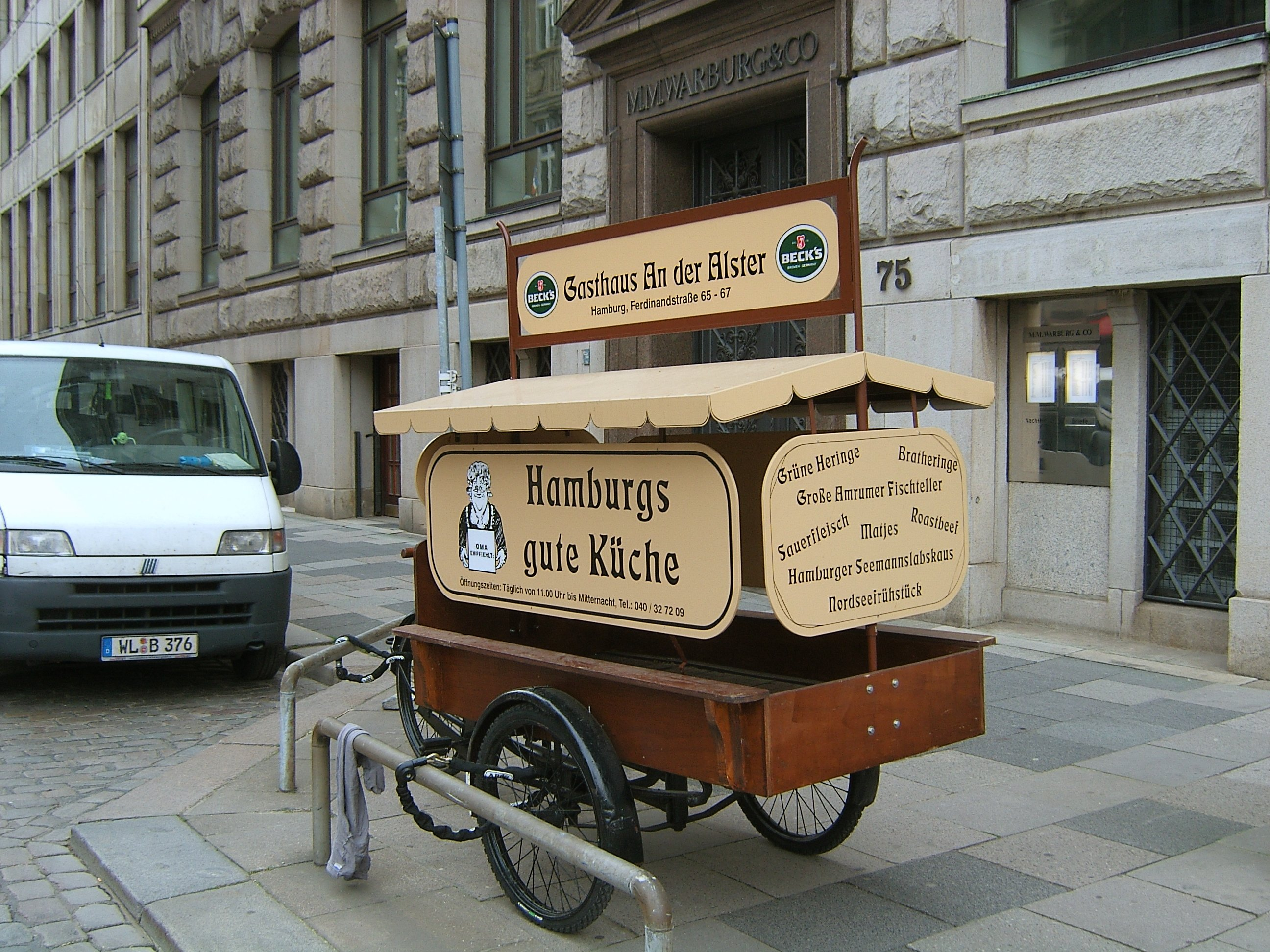 Hamburg, Innenstadt, Ferdinandstraße, Werbung für Hamburgs gute Küche.